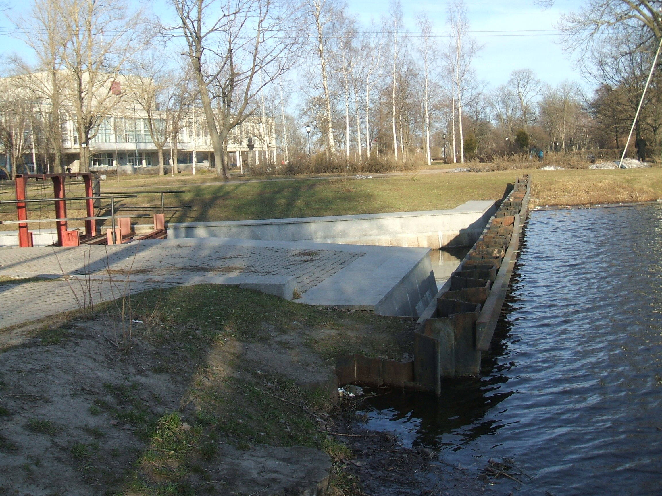 Сестрорецкий Разлив Плотины